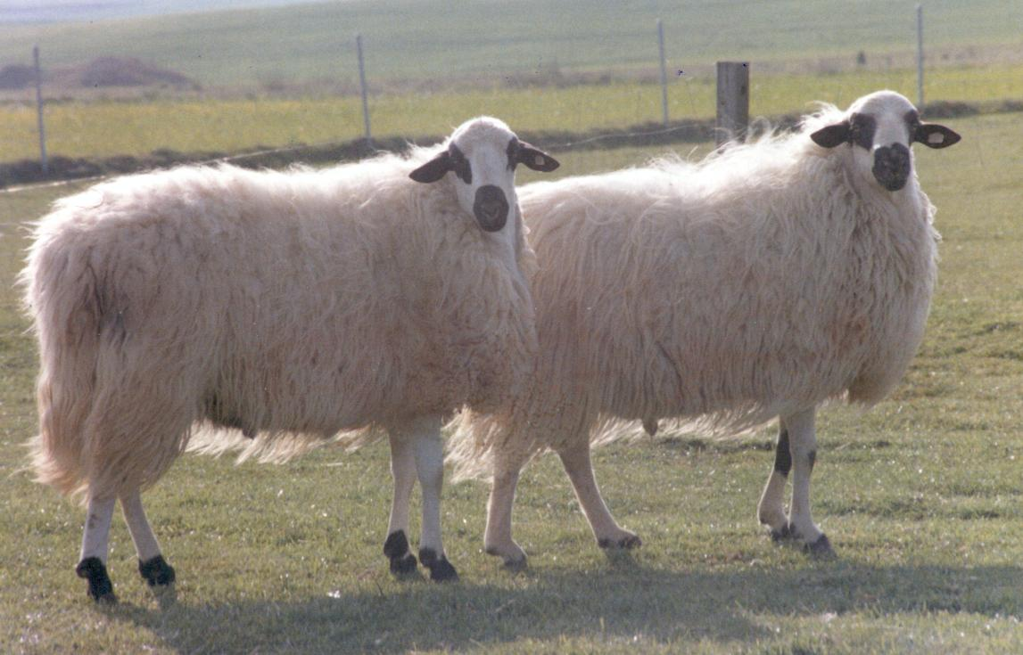 Dos sementales de raza churra en una pradera